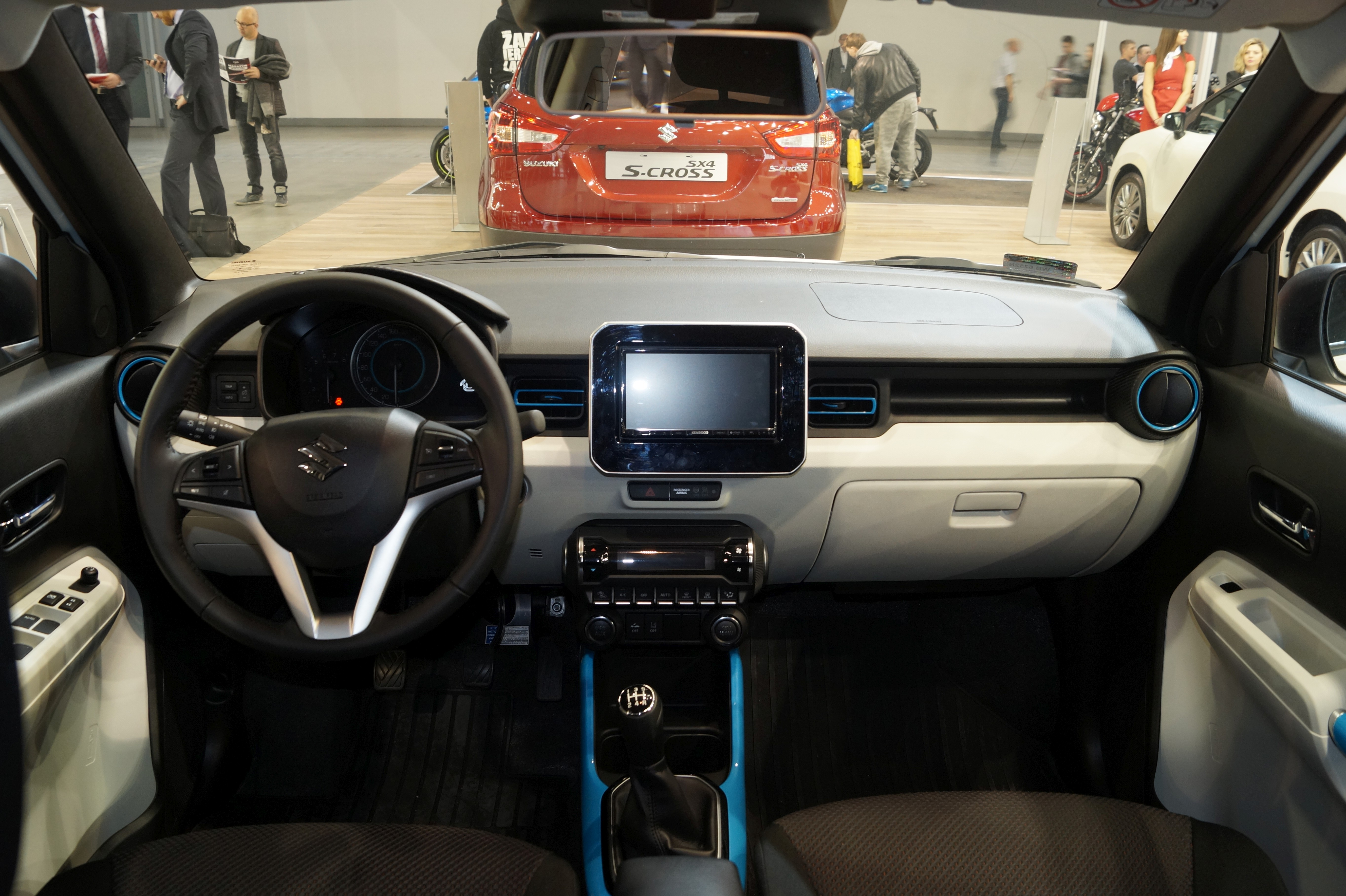 Wnętrze Suzuki Ignis na Motor Show Poznań 2017.